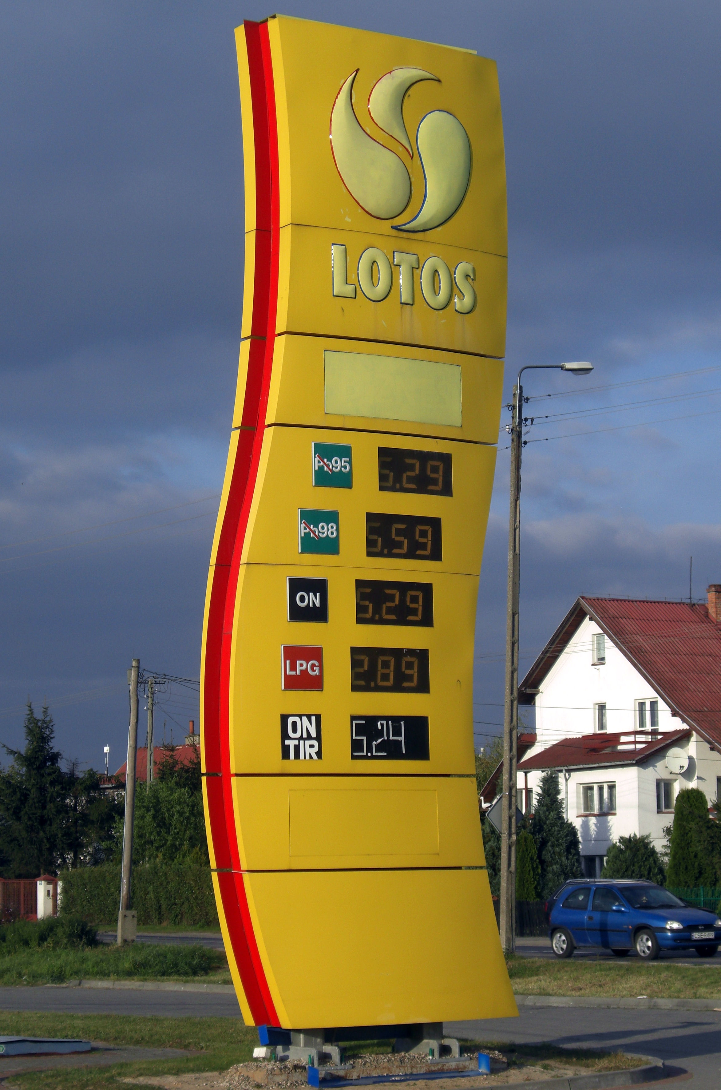 Preissäule